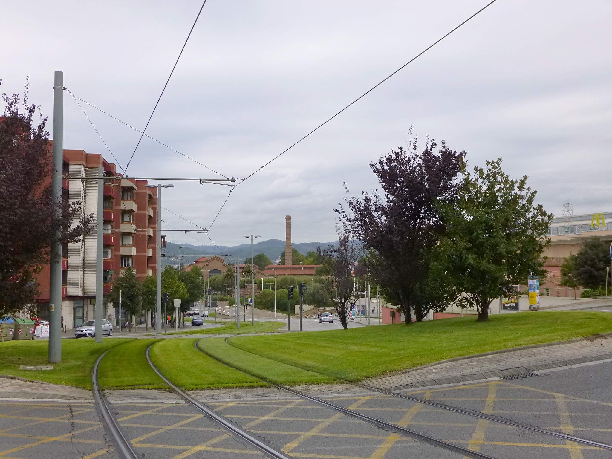 Cornellá de Llobregat (Barcelona)